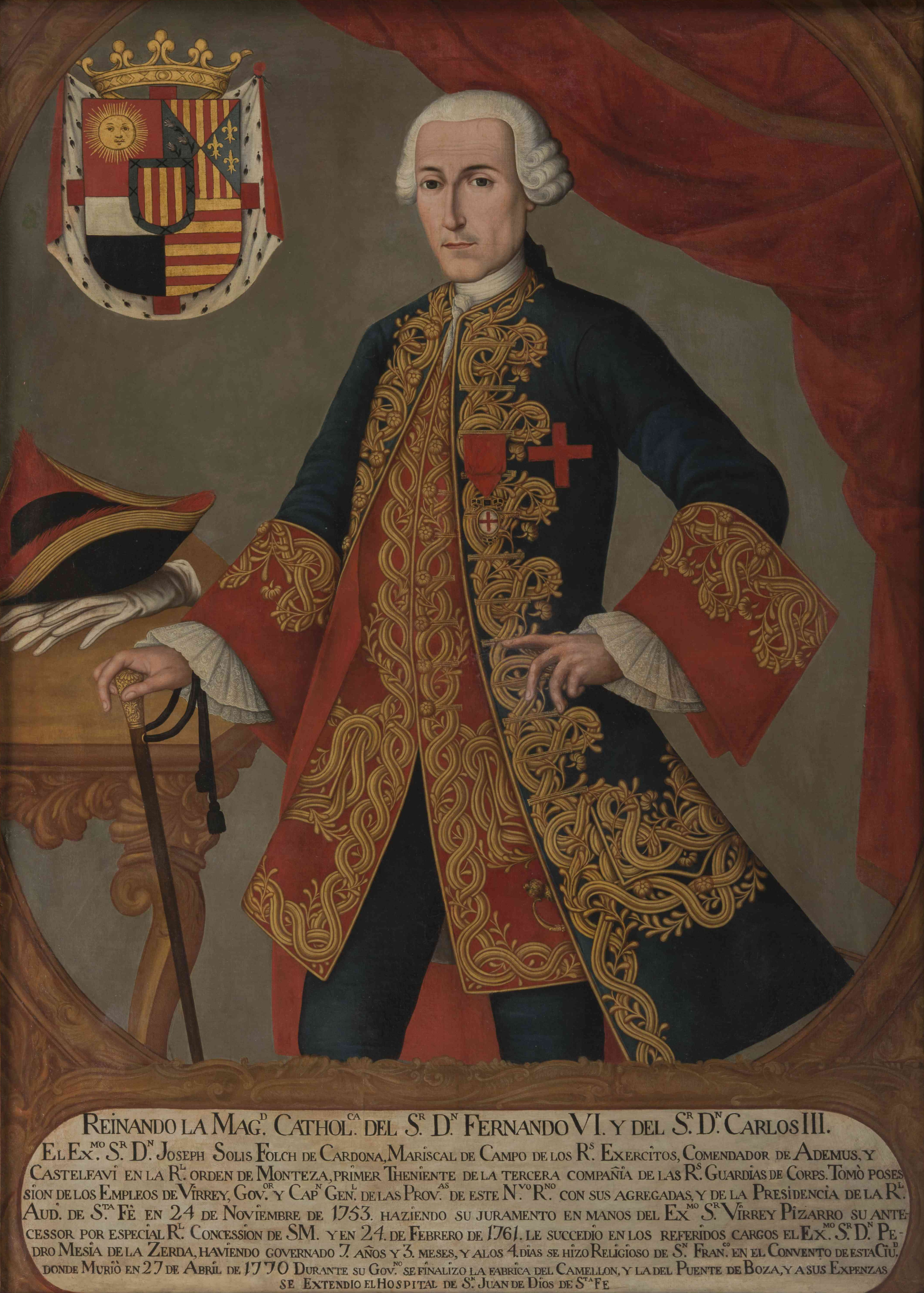 Virrey José Solís Folch de Cardona.